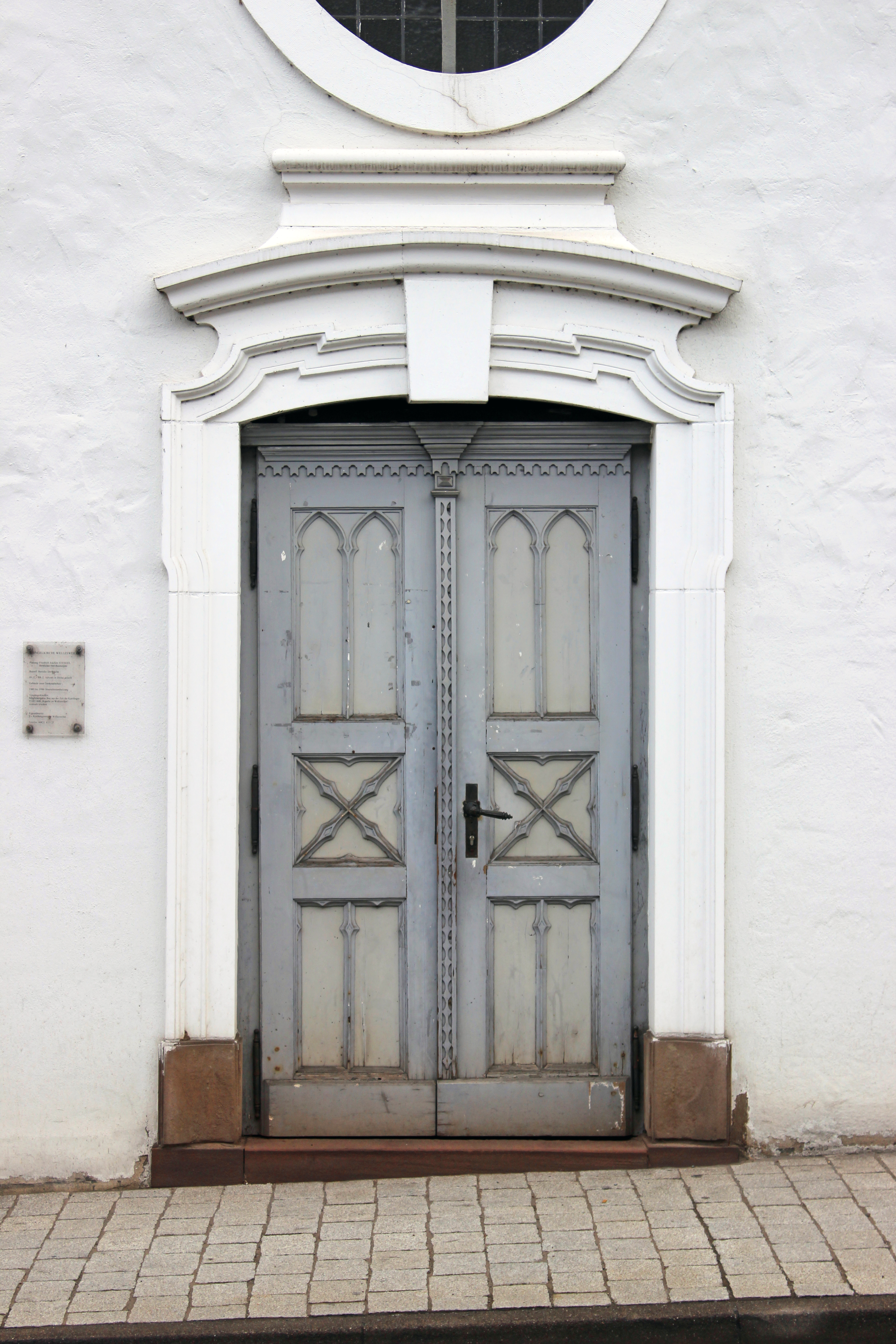 Portal der evangelischen Stengelkirche in Wellesweiler, Stadt Neunkirchen, Saarland